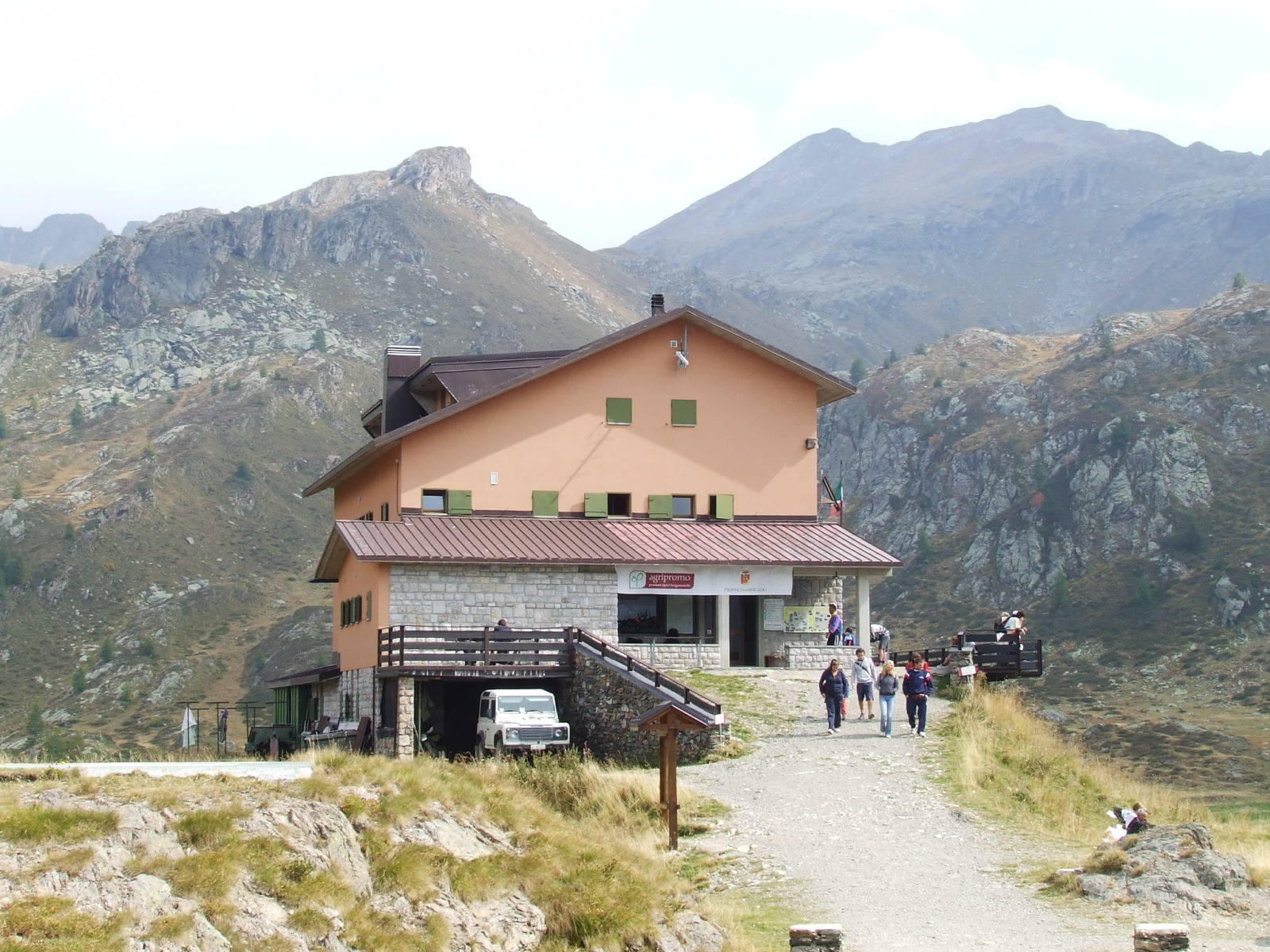 Foto del rifugio fratelli Calvi, di Orobicon